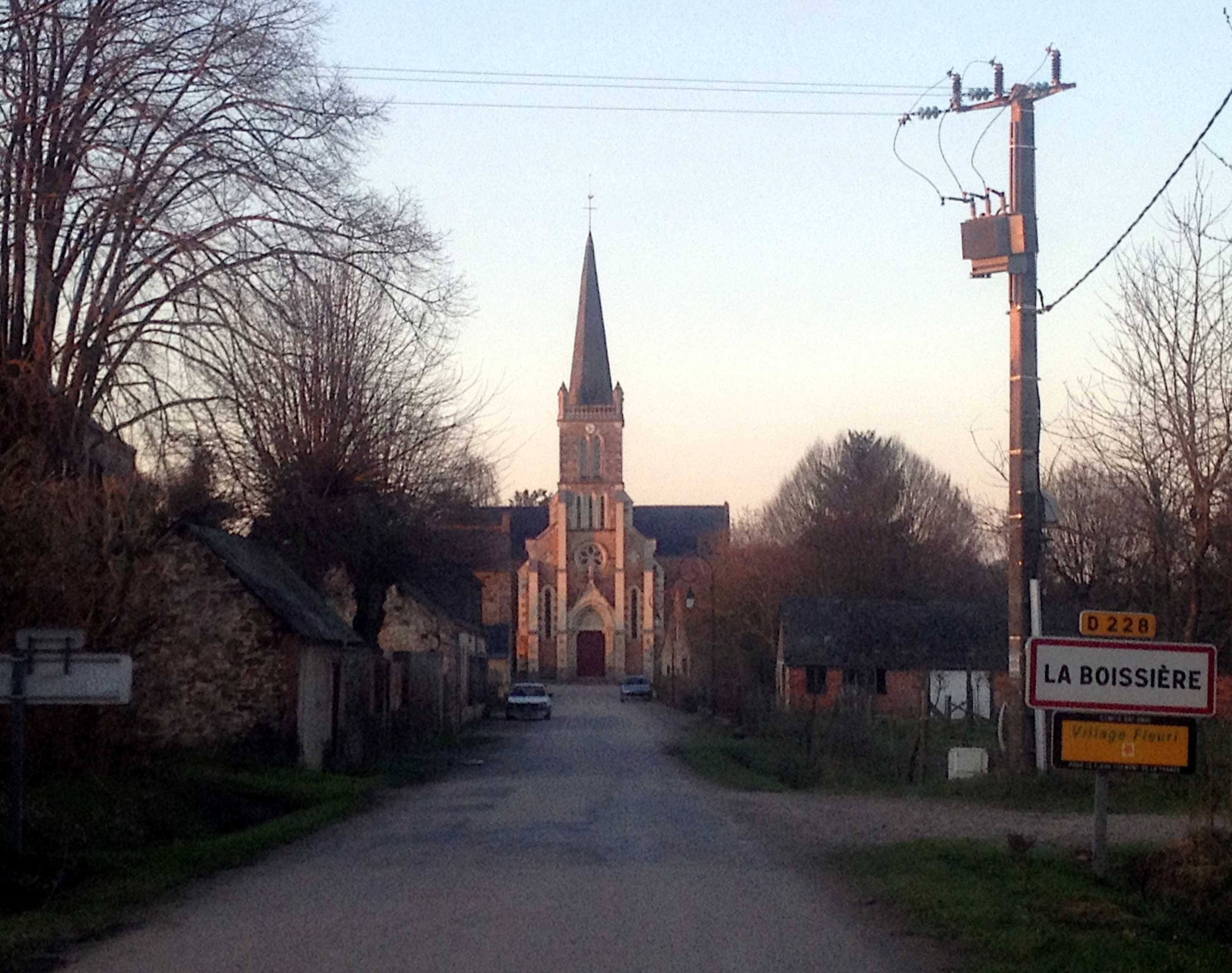 Mayenne, France